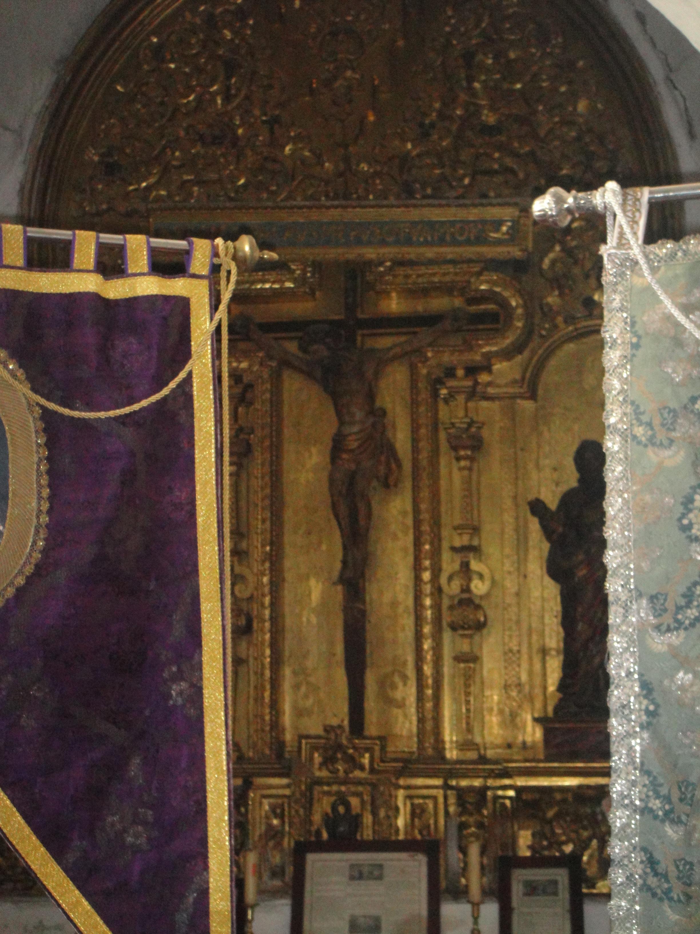 Retablo de Cristo Crucificado. Ermita de Jesús Nazareno de Fuente Obejuna, provincia de Córdoba, (España).